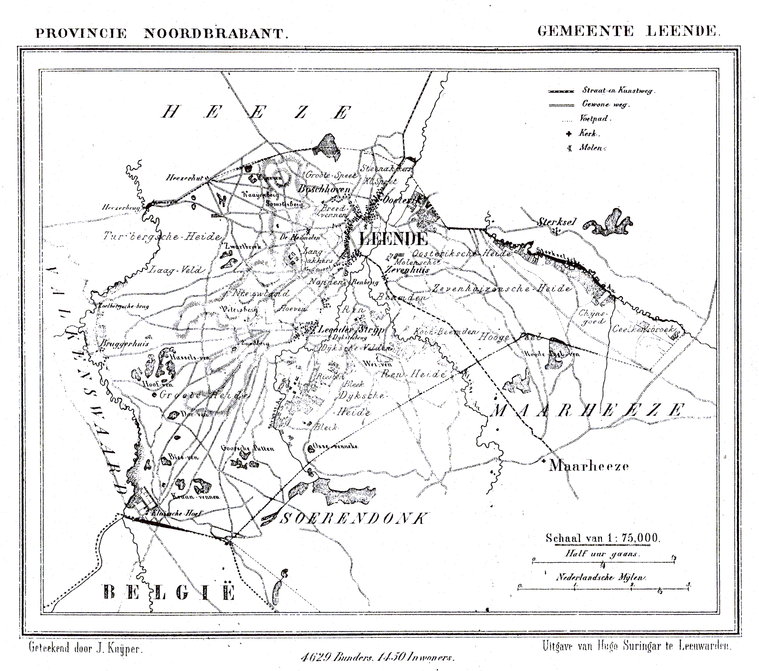 Nederland, Noord-Brabant, Gemeente Leende